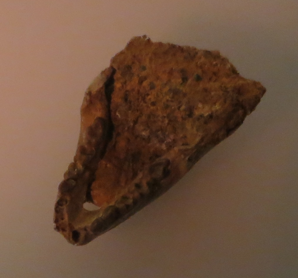 Fossil of Caenopithecus - Took the picture at Natural History Museum, Basel